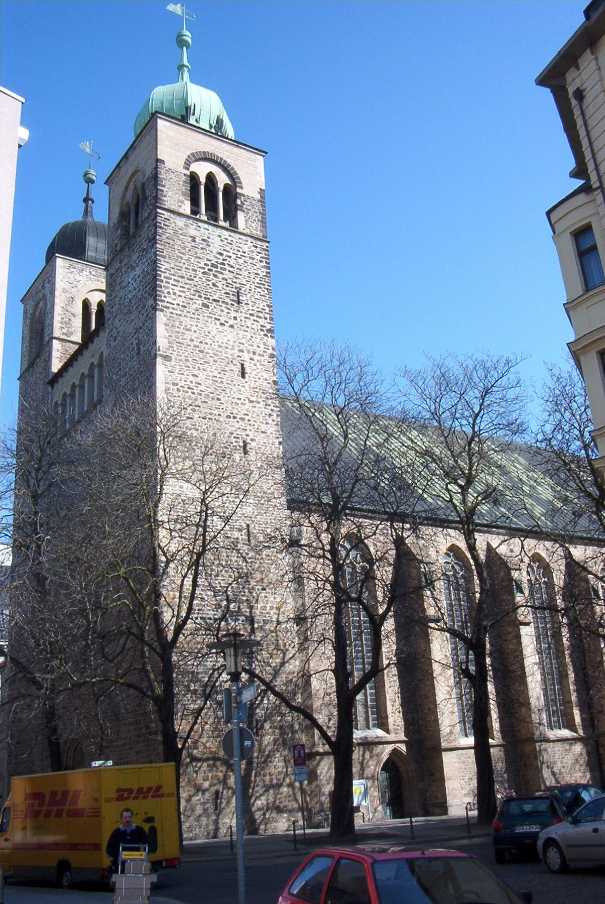 Sankt-Sebastian-Kirche Magdeburg, Westseite.